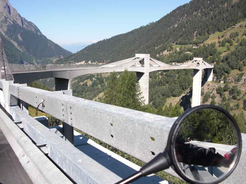 Ganterbrücke